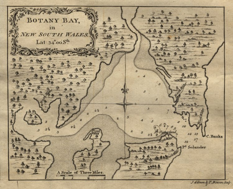 Karte der Botany Bay nach den Vermessungsdaten Cooks (18Jh.)